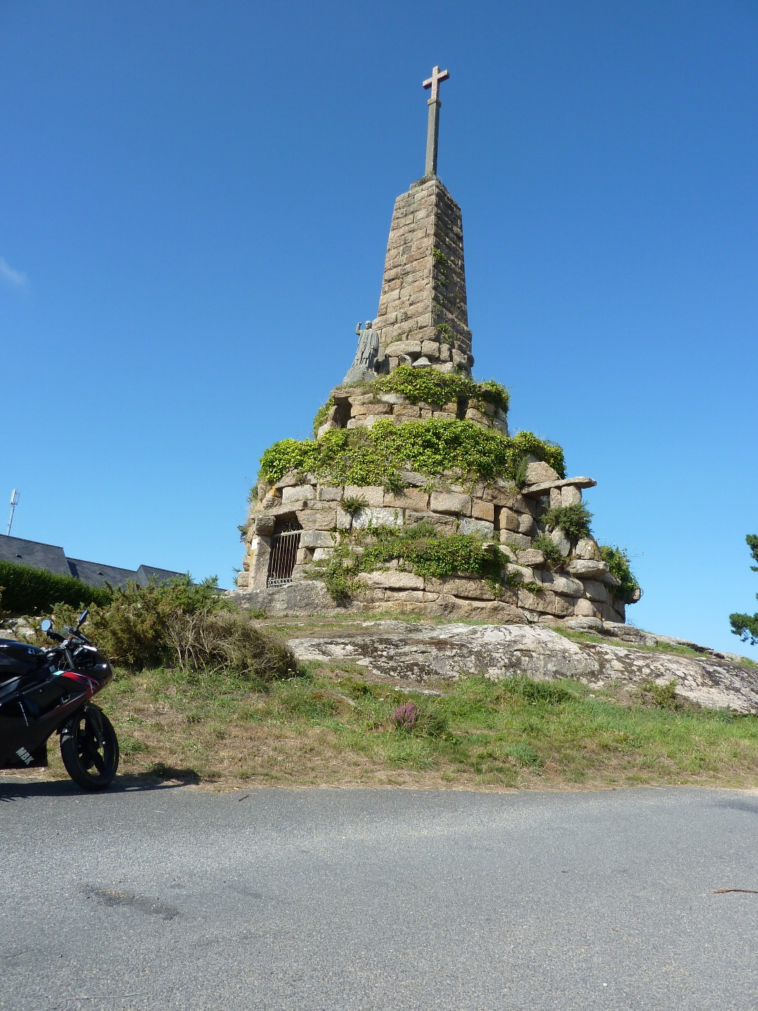 Calvaire au bourg de Trégastel